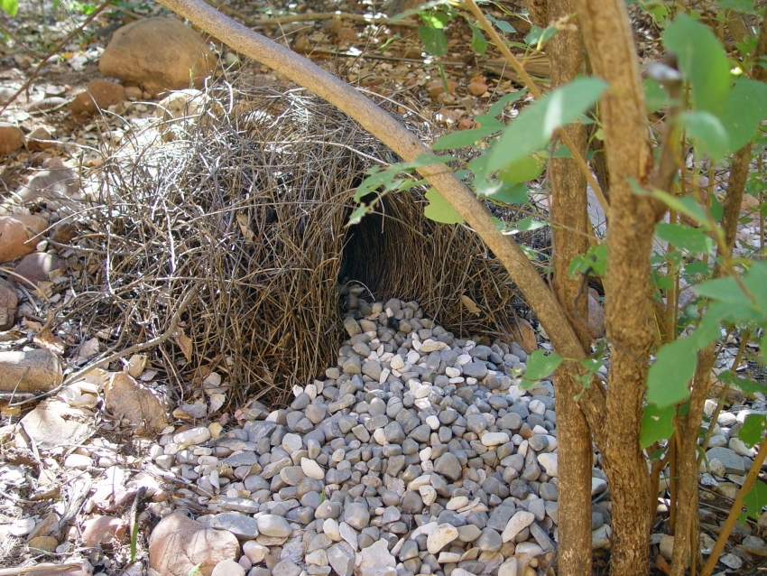 Bungle Bungles Bower bird nest 190503